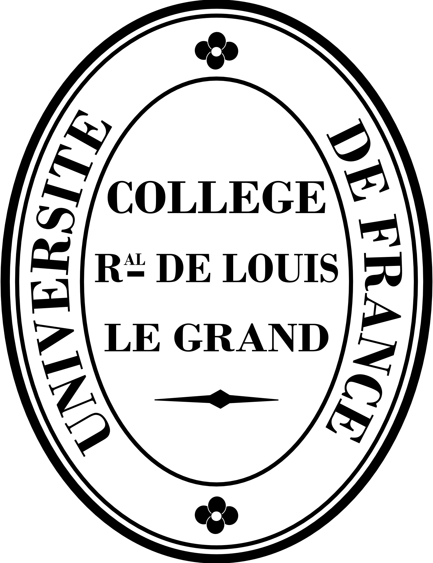 Sceau utilisé dans les armes du Collège Royal de Louis le Grand (1763-1849)